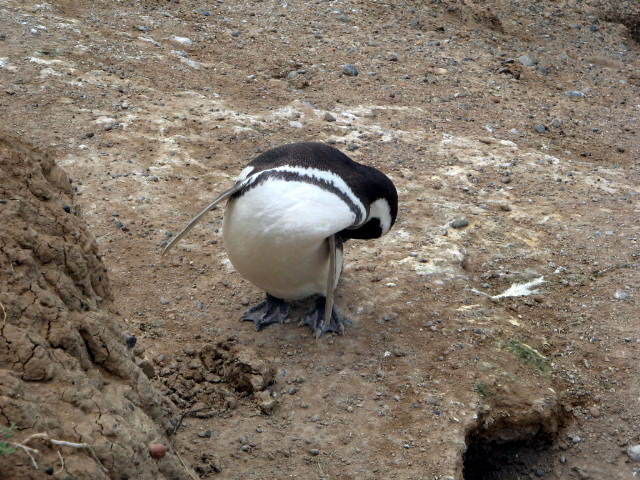 Pingüino de Humboldt acicalandose. Punta delgada, Argentina.